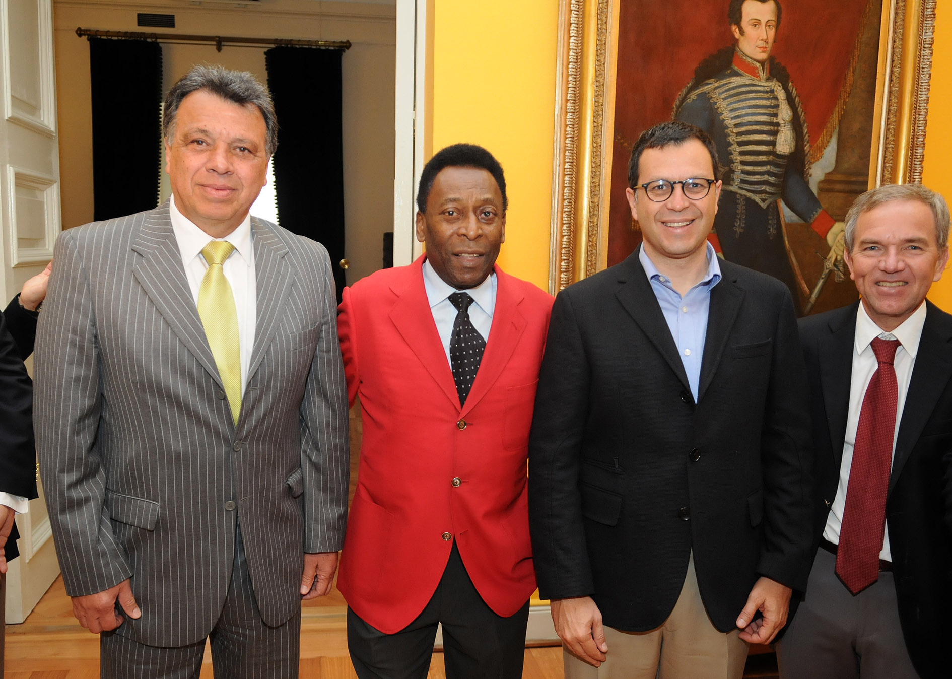 Reunión con Pelé en el Palacio de la Moneda. De izquierda a derecha: Elías Figueroa, Pelé, Rodrigo Hinzpeter, Gabriel Ruiz-Tagle.